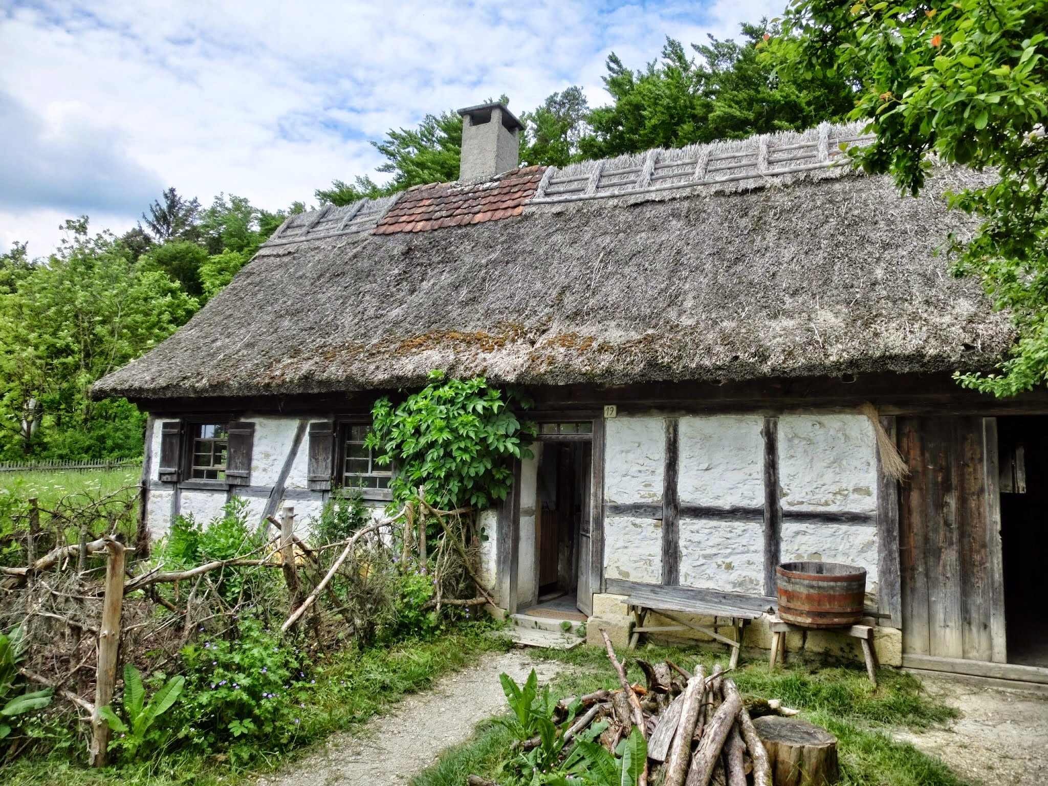 Deutschland - Baden-Württemberg - Landkreis Tuttlingen - Neuhausen ob Eck: Freilichtmuseum, Tagelöhnerhaus Delkhofen